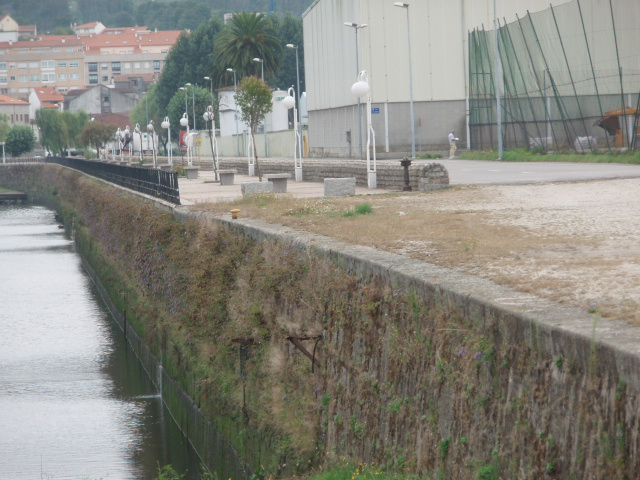 Puerto romano en Pontecesures - Antiguo puerto romano